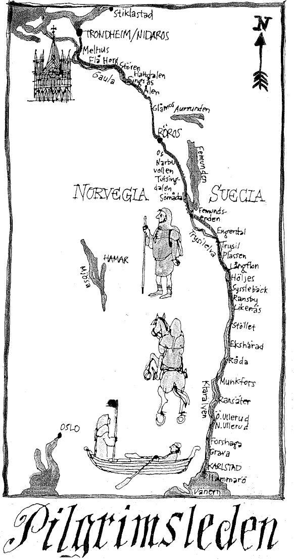 Pilgrimsleden ill. Nils Gunnar Svensson 2006